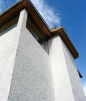 Galleri Bodøgaard, fasade